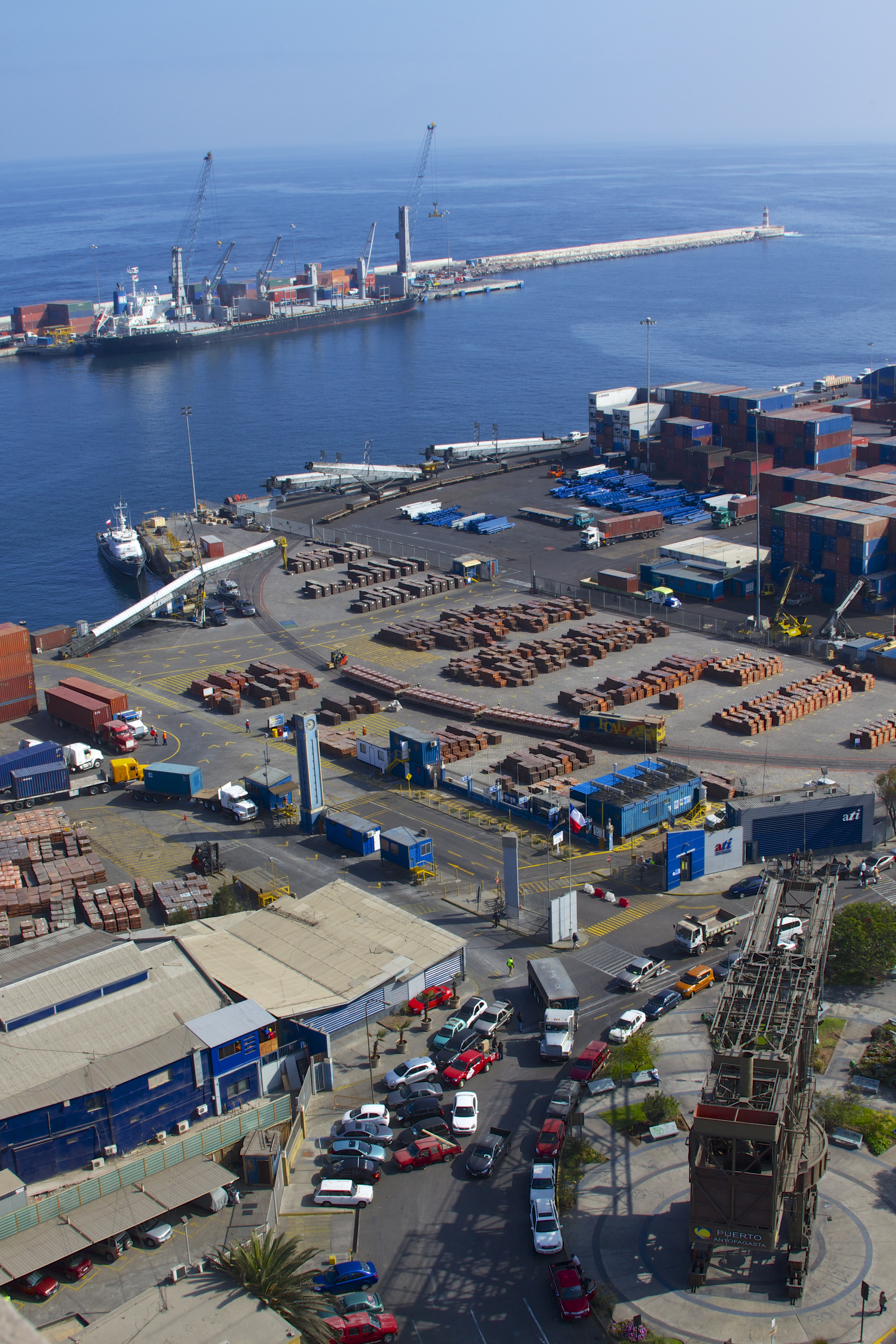 puerto